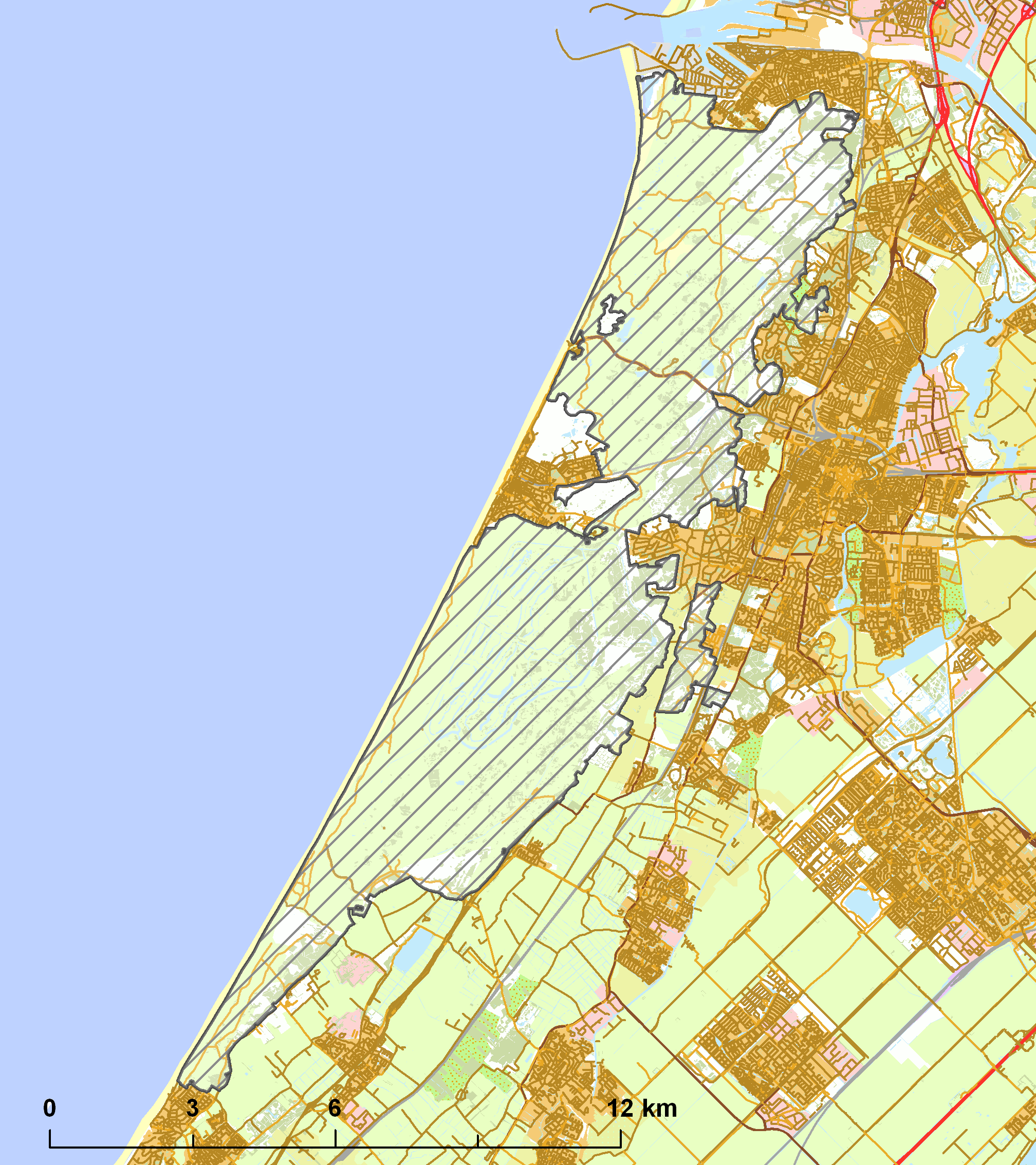 Natura2000 - Kennemerland-Zuid.png